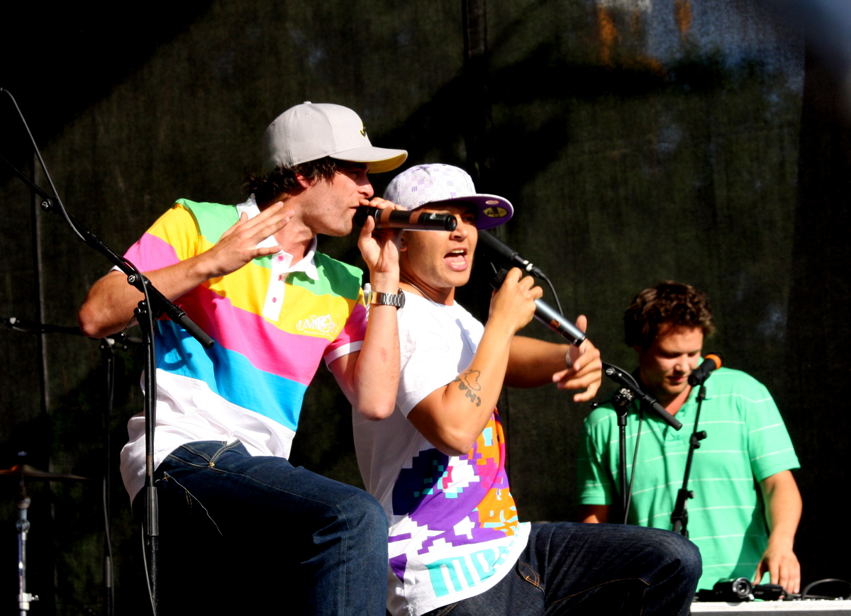 Erik og Kriss